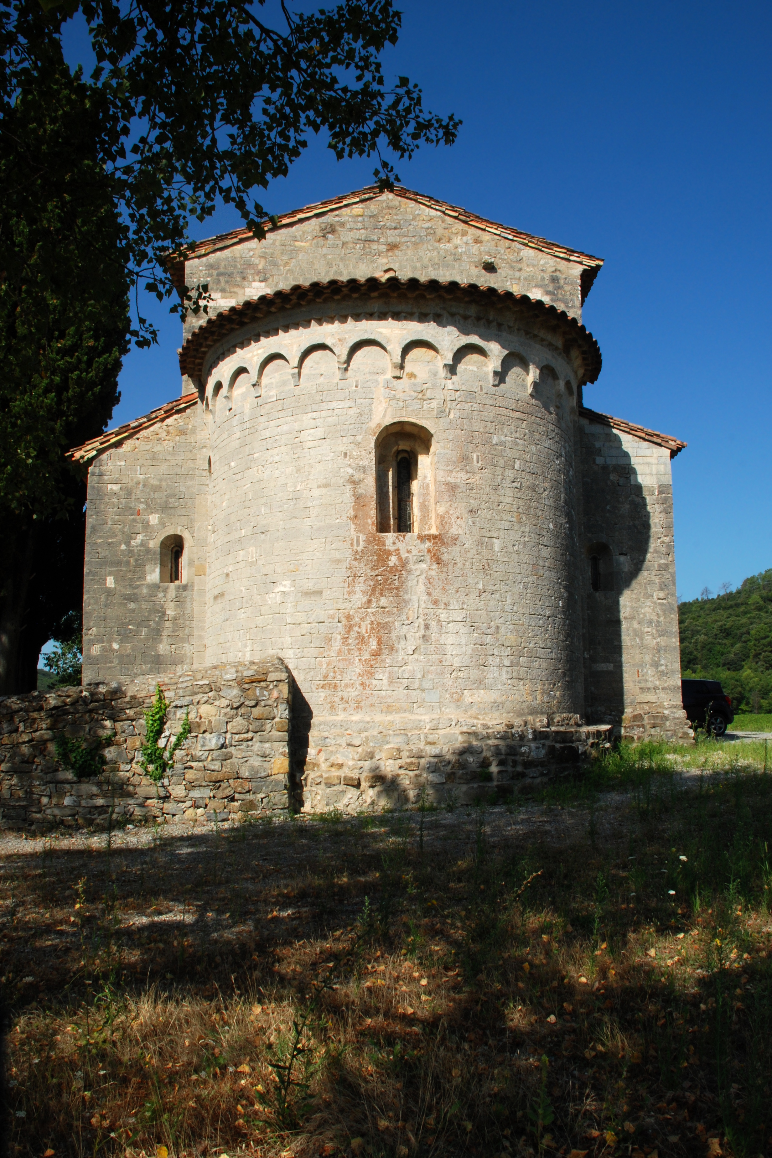 France - Gard - Église Saint-Baudile de Tornac